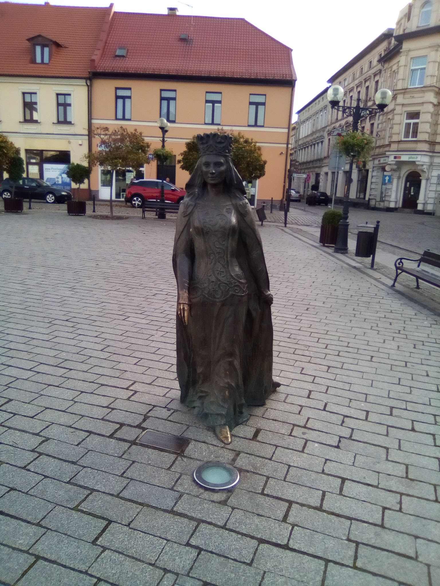 Пам'ятник королеви Ядвіґи. Знаходиться на площі Ринок в місті Іновроцлав, Польща.